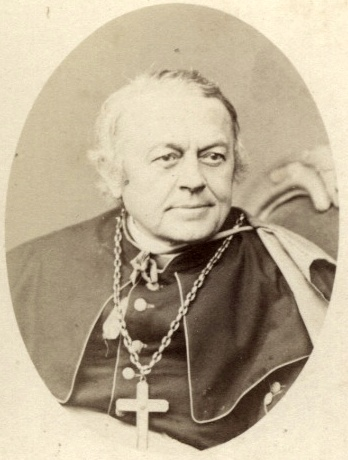 Karl Joseph von Hefele, Bischof von Rottenburg